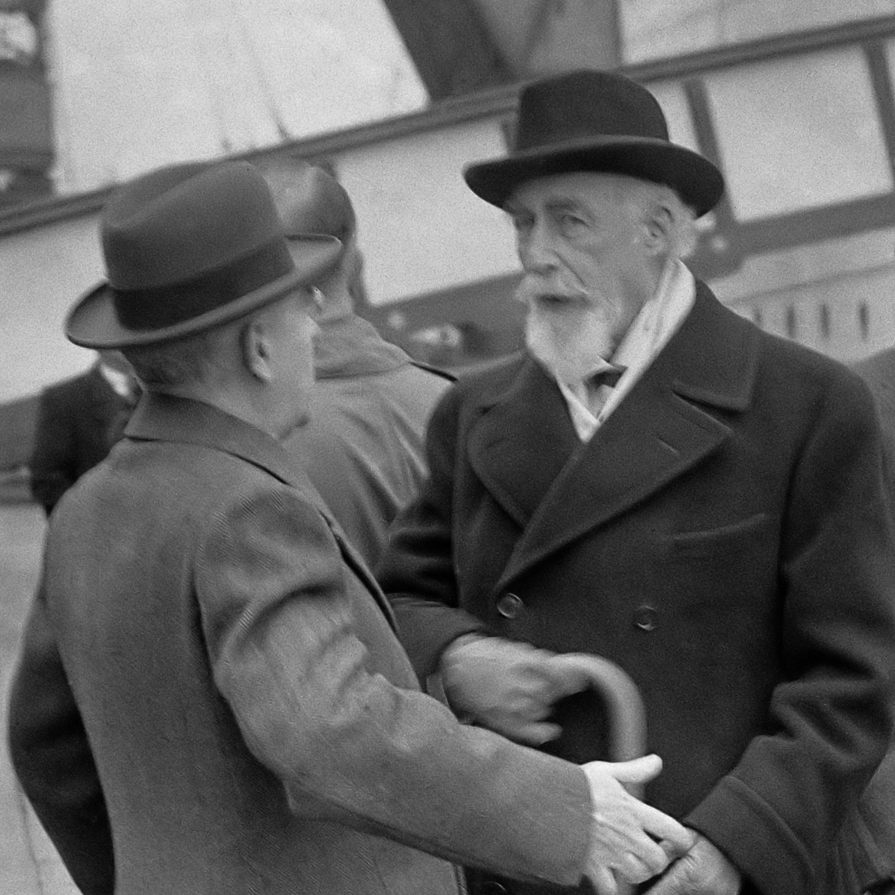 Aankomst Herman Baruch 4 april 1947